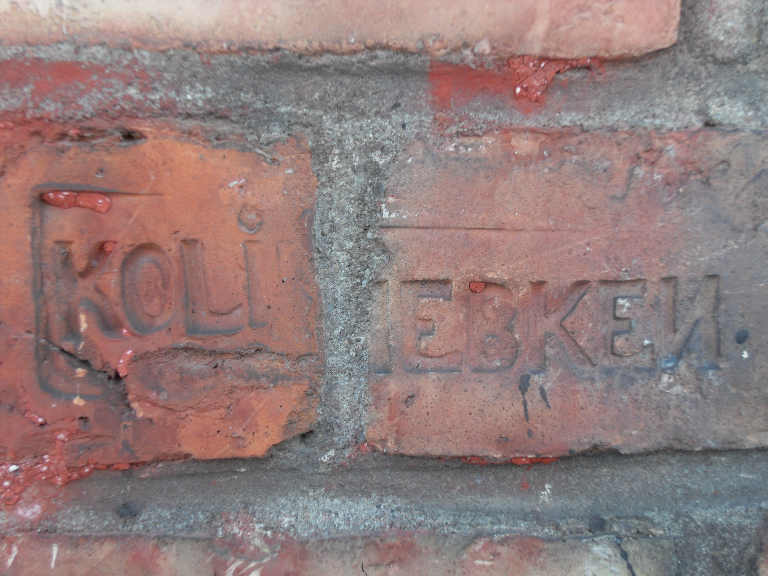 Stara zajezdnia tramwajowa w Oliwie - cegły (wyprodukowane w cegielni w Gdyni Kolibkach - niemiecki stempel: "KOLIEBKEN") ścian.